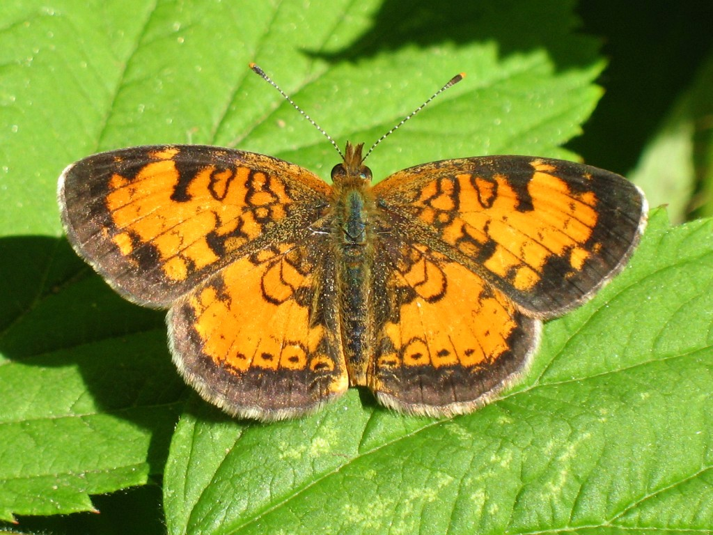 Croissant nordique -- Northern Crescent, Order Lepidoptera -- Family Nymphalidae, Bas-Saint-Laurent -- Province de Québec -- Canada, Prise en juin 2007 -- Taken in June 2007